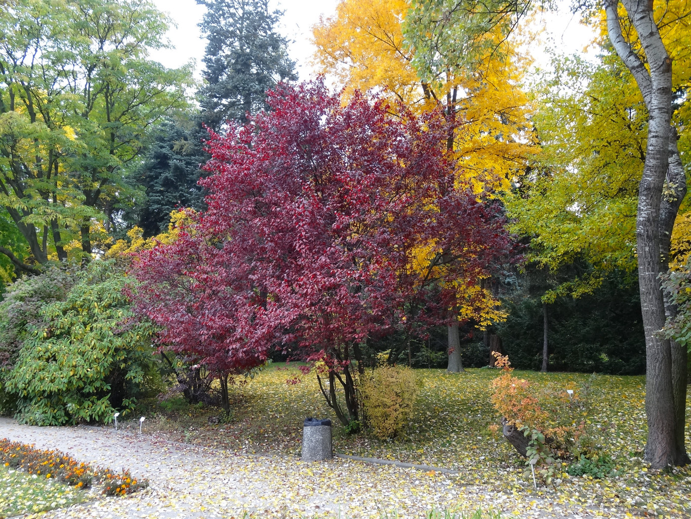 Ogród Botaniczny - arboretum Uniwersytetu Kazimierza Wielkiego w Bydgoszczy przy pl. Weyssenhoffa